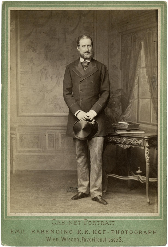 Bildnis in mittleren Jahren.